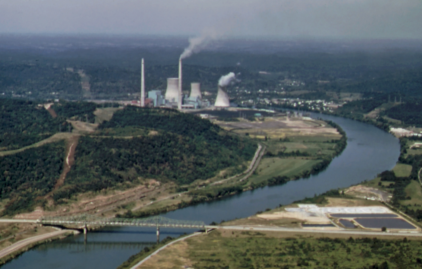 Die Schornsteine und Kühltürme des John-E.-Amos-Kraftwerks am Kanawha River